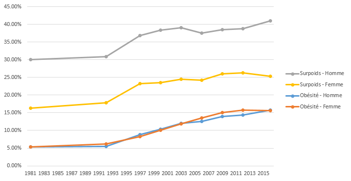 Obésité en France par sexe